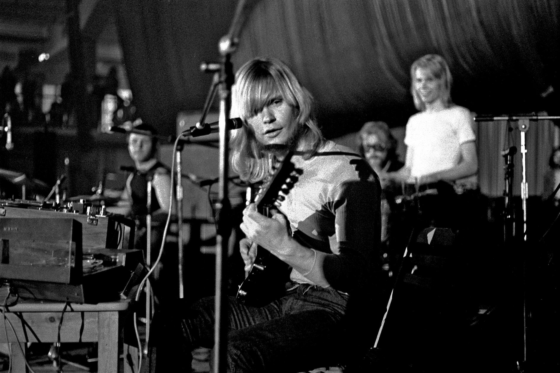 Achim Reichel mit A.R. & Machine beim British-German Pop Meeting am 18. September 1971 in der Hamburger Ernst-Merck-Halle Besucht bitte auch mein Rock- und Pop-Archiv auf